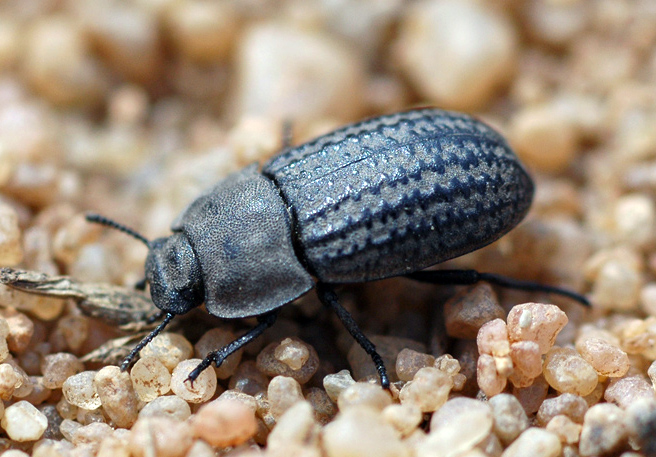 Exerzierplatz Erlangen BY - Opatrum sabulosum - Gemeiner Staubkäfer